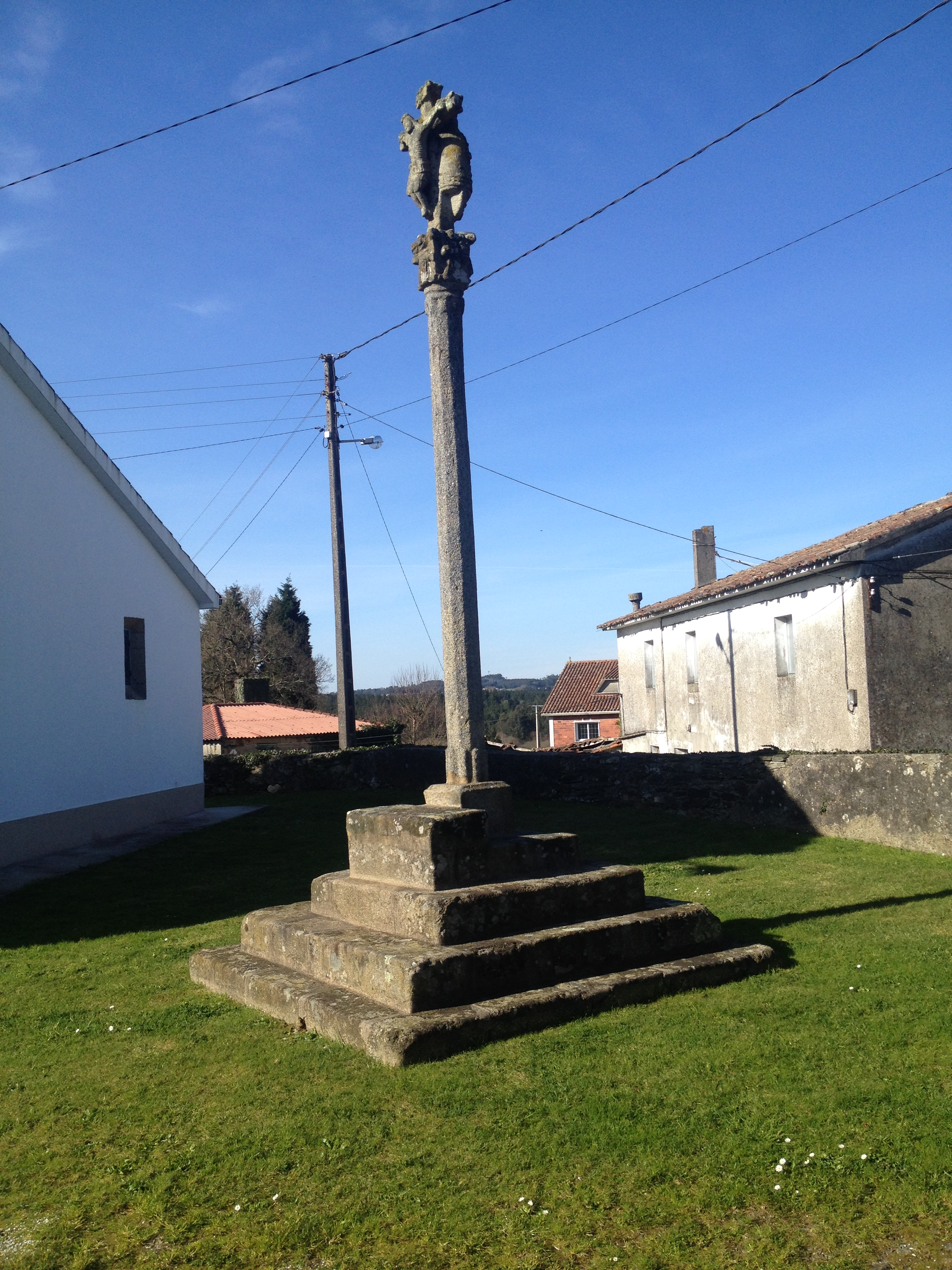 Cruceiro de granito de la parroquia de San Martiño de Oroso, fotografía tomada por Brais Salgueiro Gendre.